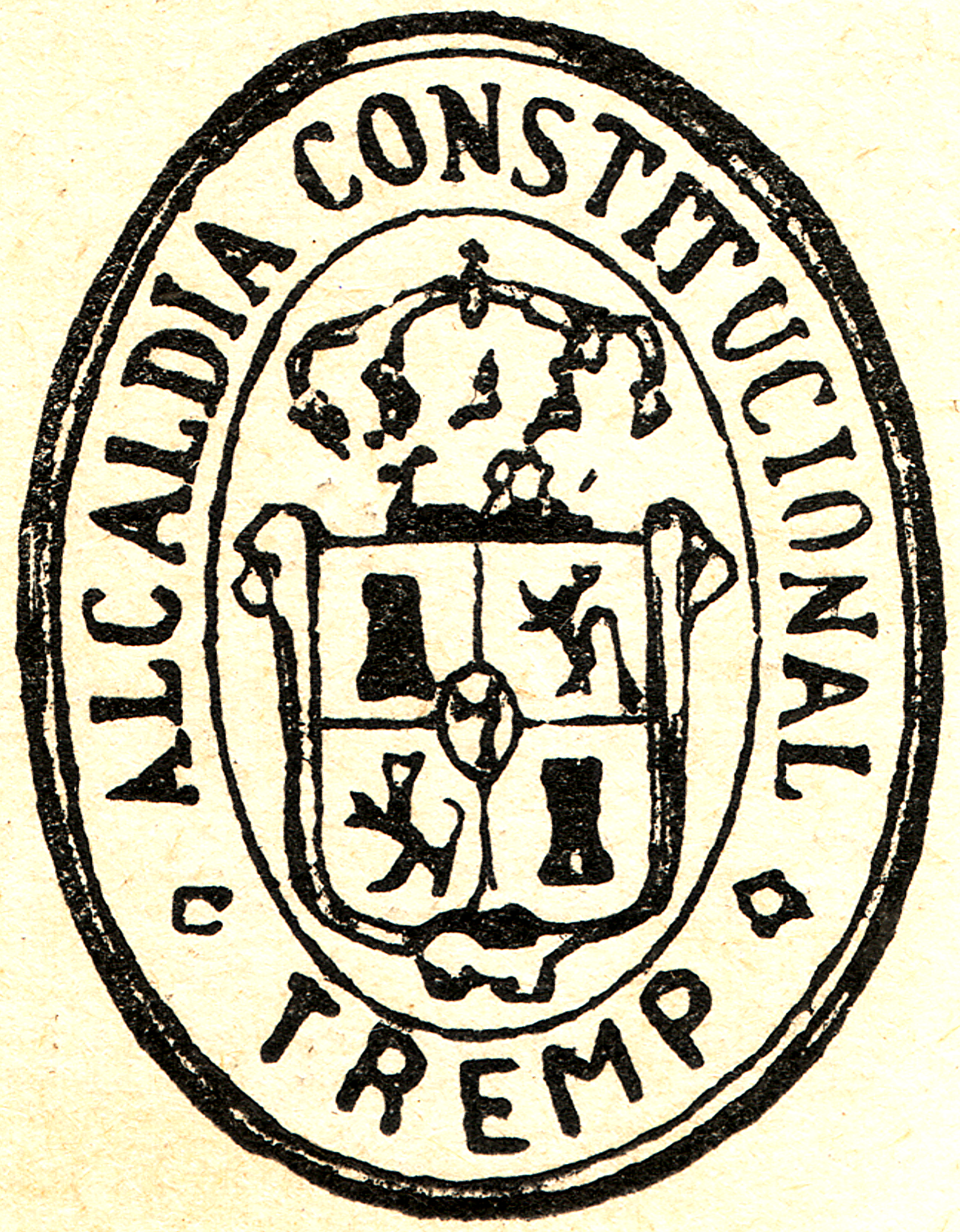 Segell municipal de Tremp vers 1900 (Tremp, Pallars Jussà)